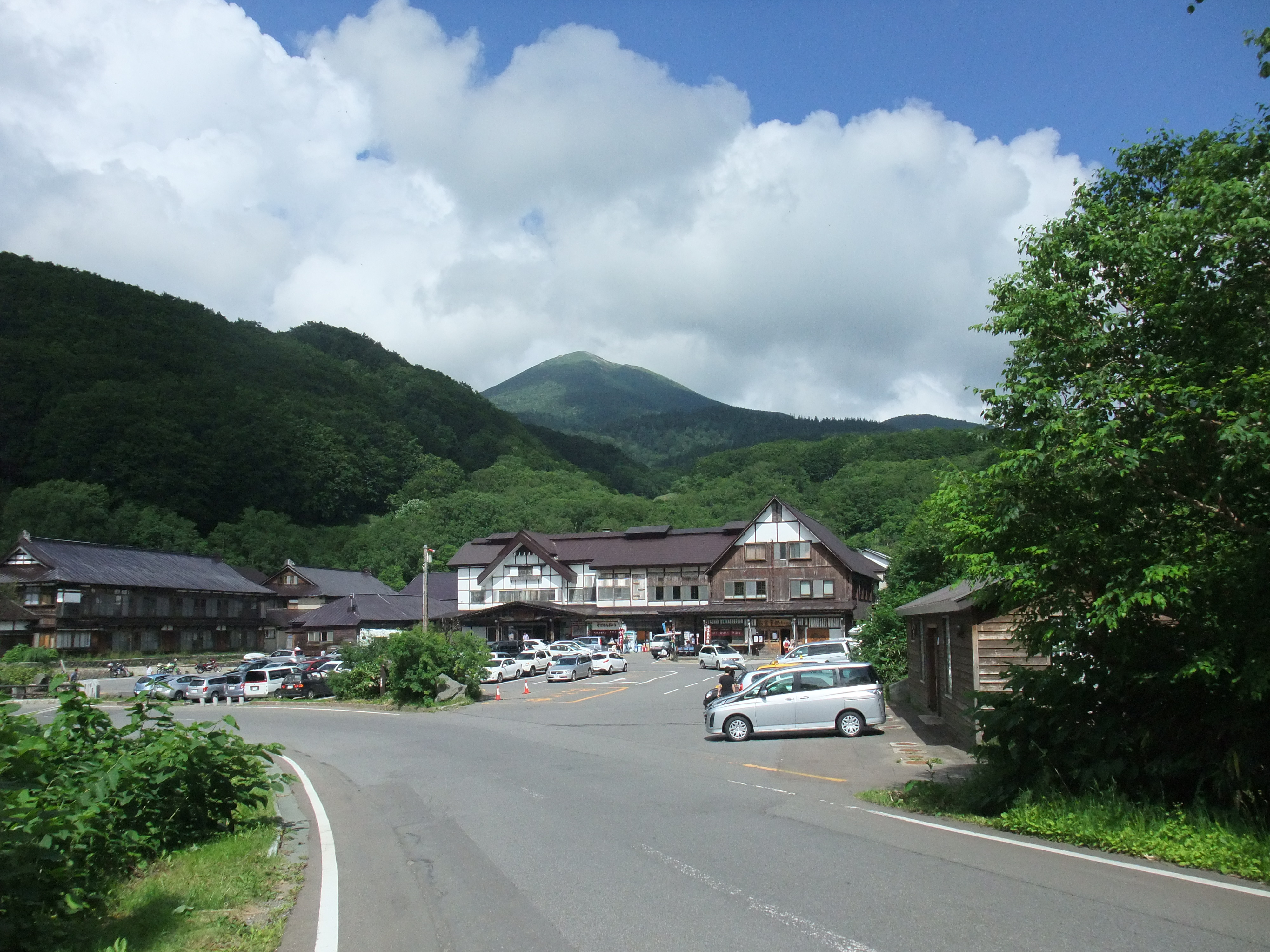 酸ヶ湯温泉方面から見た八甲田大岳